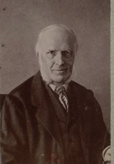 Jules Guyot (1807-1872) photo Atelier Nadar